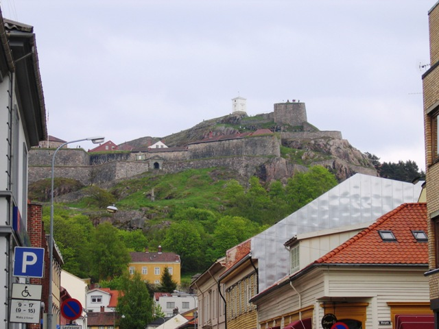 Fredriksten festning, Halden, Norway.